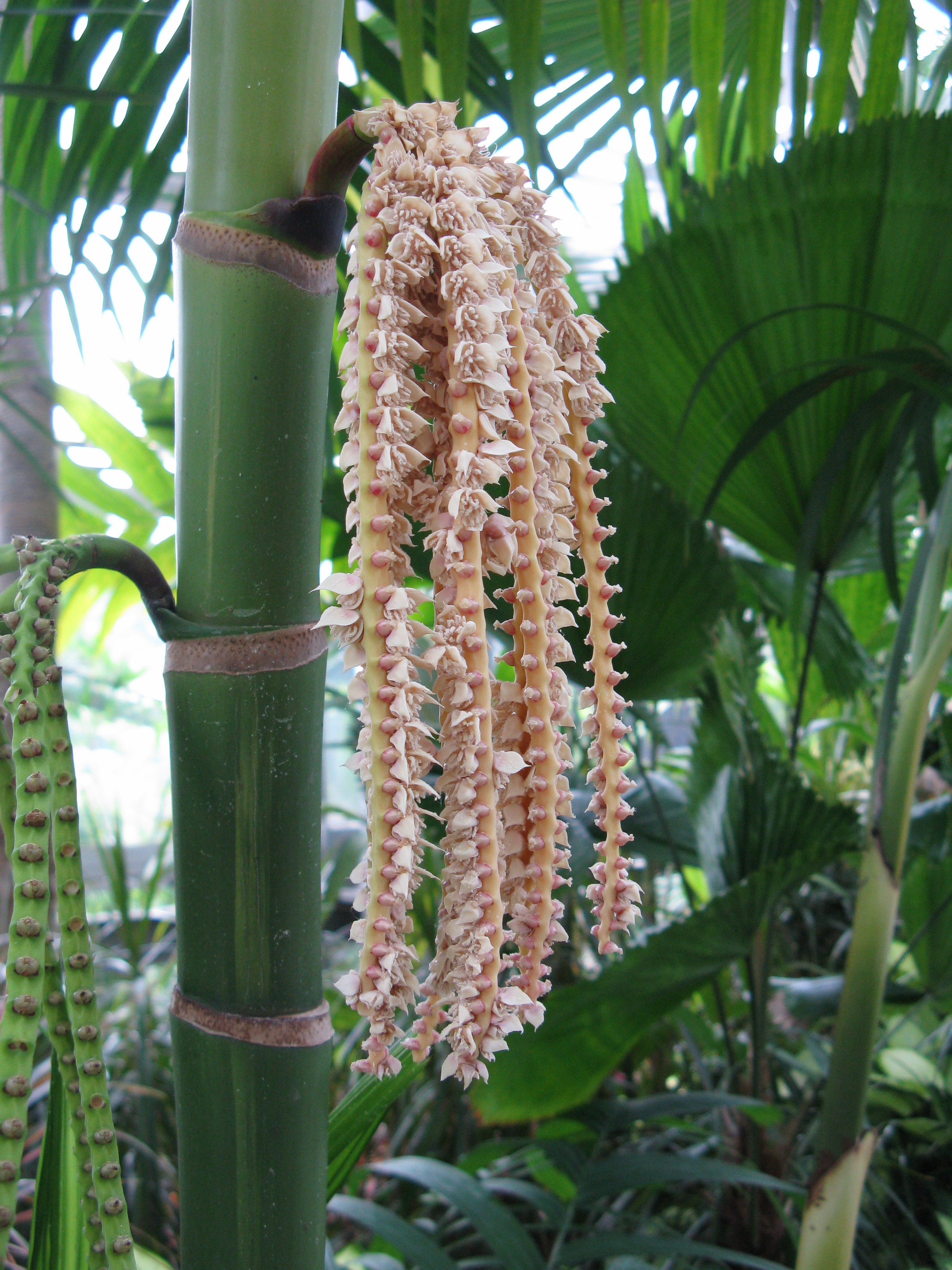 Scientific name Pinanga coronata Place:Sakuya Konohana Kan,Osaka,Japan